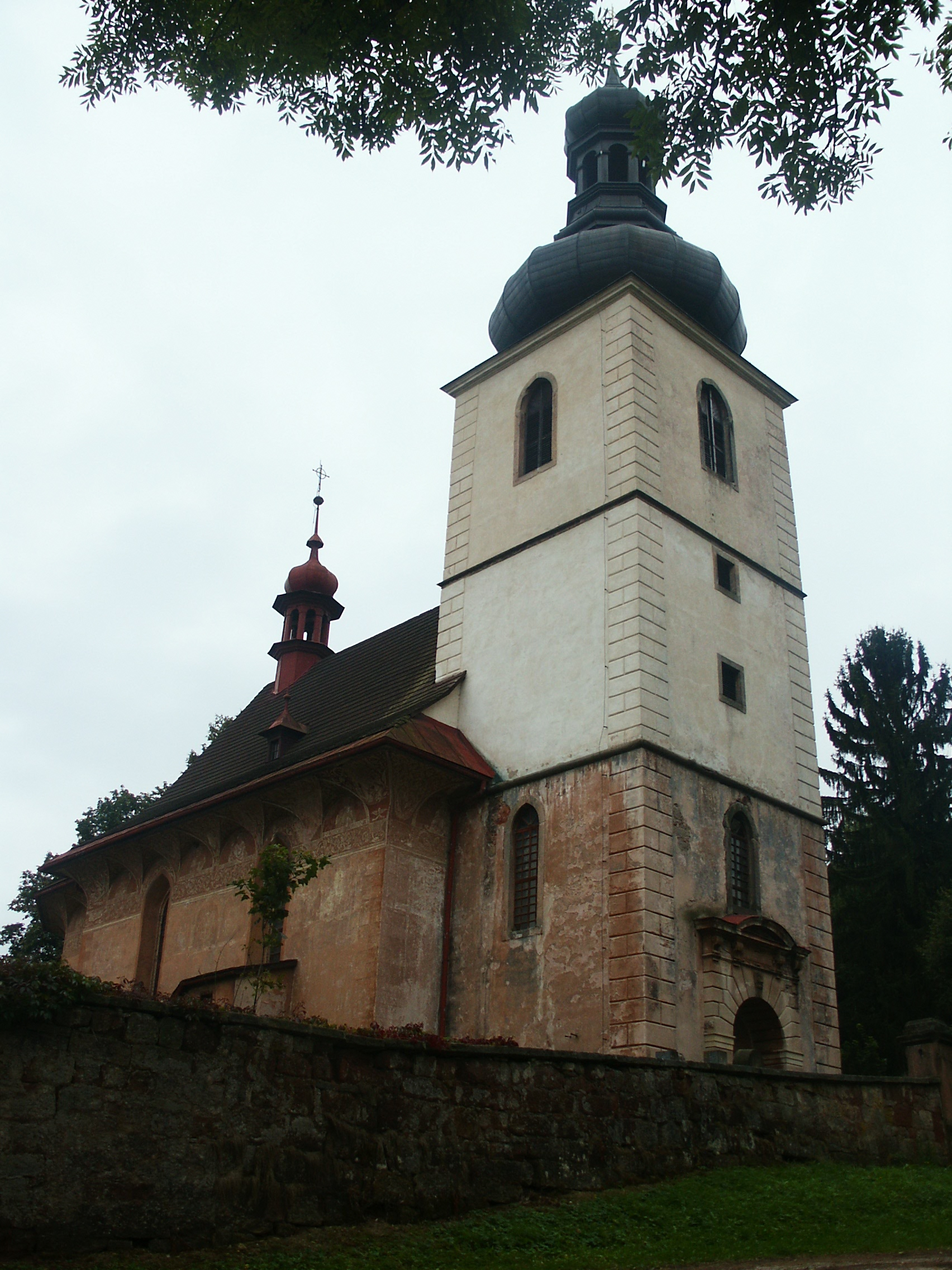 Kostel sv. Jakuba, Dolní Olešnice